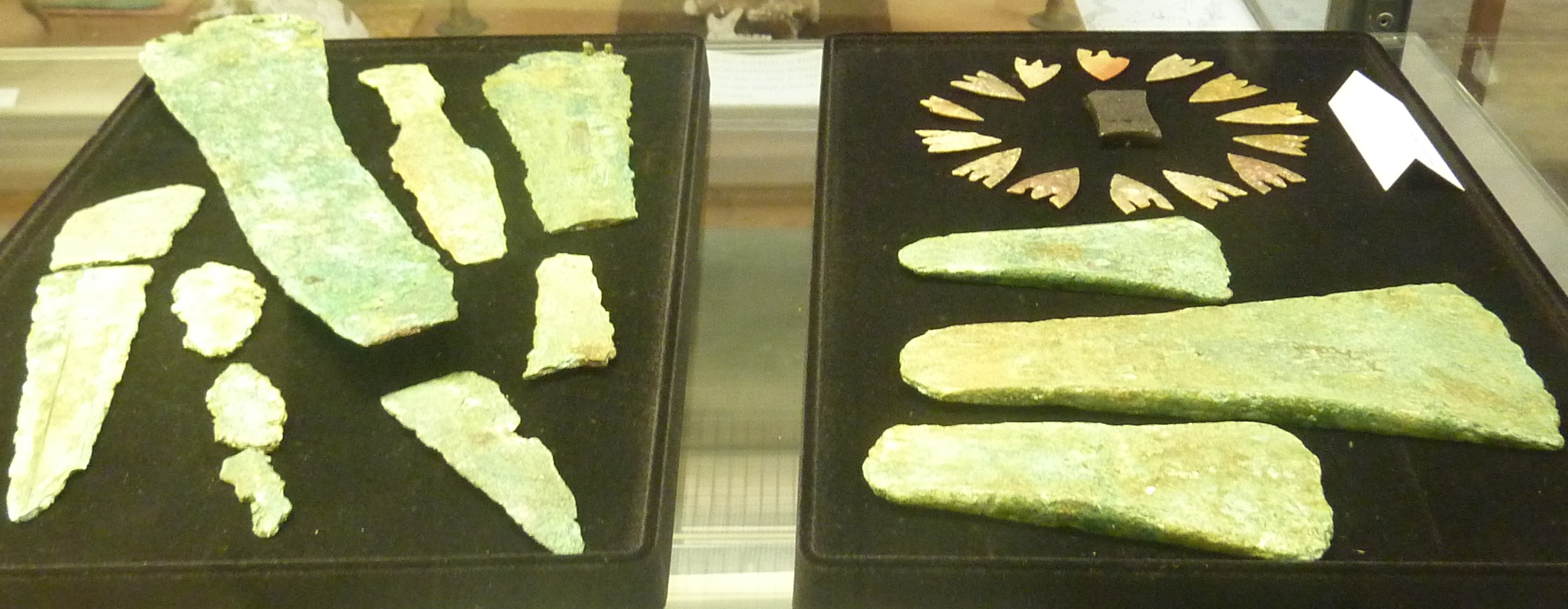 Mobilier trouvé dans le tumulus de Kerguévarec en Plouyé, datant de l'âge du bronze, et contenant entre autres des pointes de flèche et un brassard d'archer. Ce tumulus a été fouillé par Paul du Châtellier (Musée de la préhistoire finistérienne de Penmarc'h)